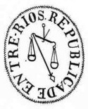 Sello utilizado en la República de Entre Ríos